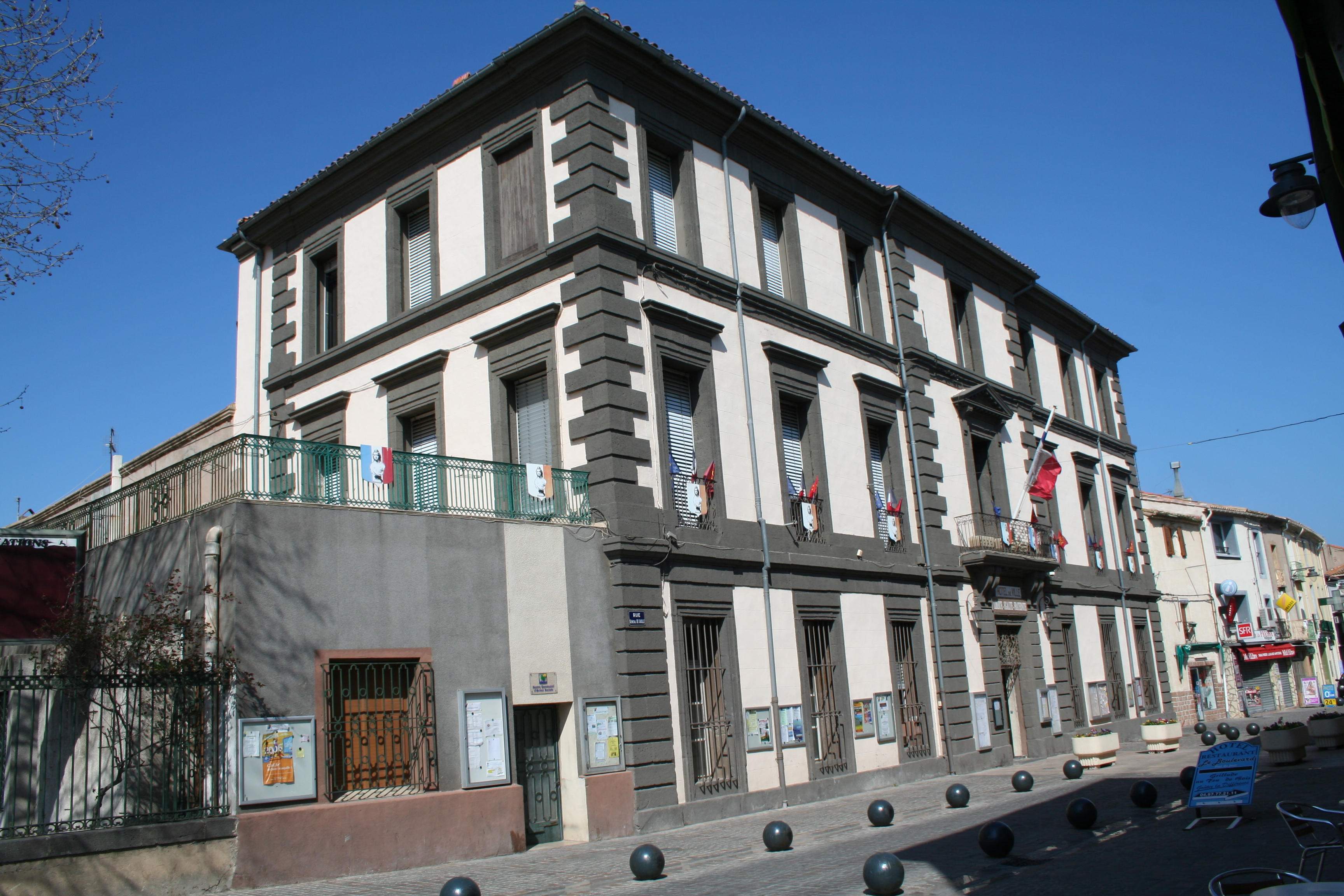 Marseillan (Hérault) - mairie, installée en 1919, dans une maison particulière.